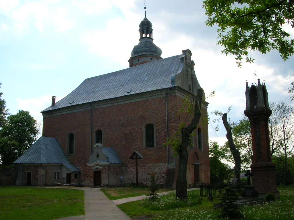 Krajenka - Kośćiół św.Anny i św.Mikołaja Autor - Bartek Wawraszko